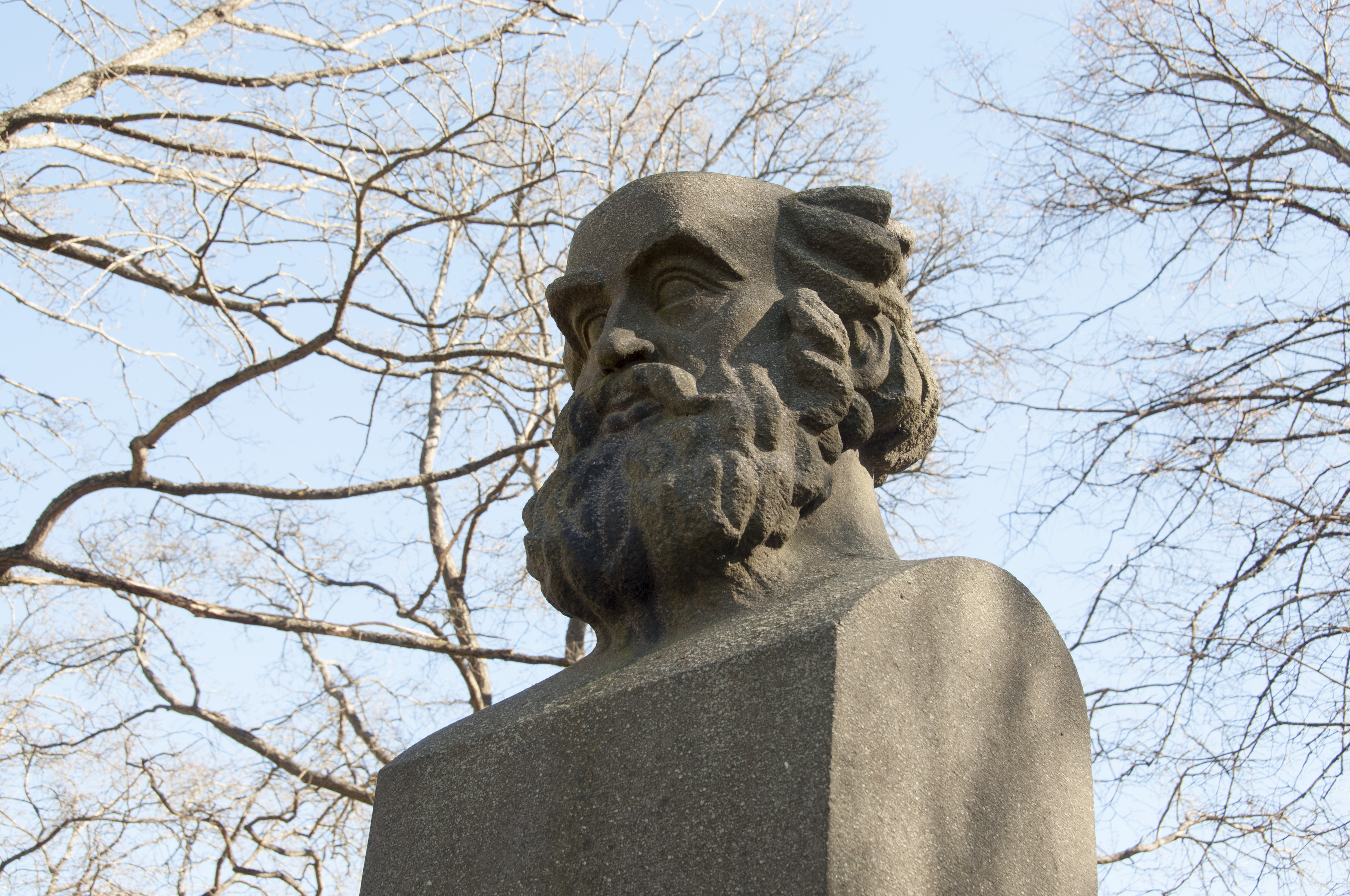 Frödinghermen på Sandgrundsudden i Karlstad av Erik Rafael-Rådberg. Huggen i granit. Avtäckt 1948